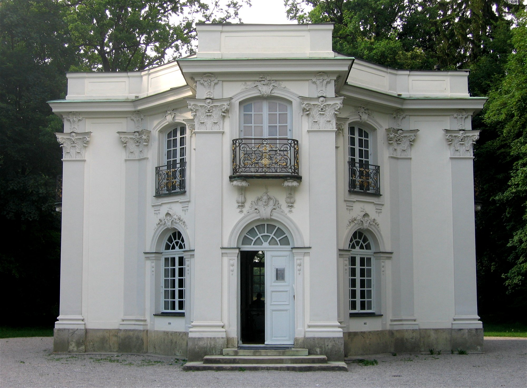 Pagodenburg im Schlosspark Nymphenburg, Muenchen